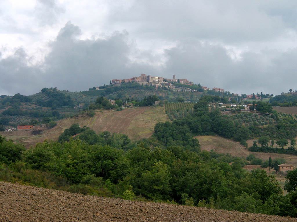 Casole d'Elsa, view